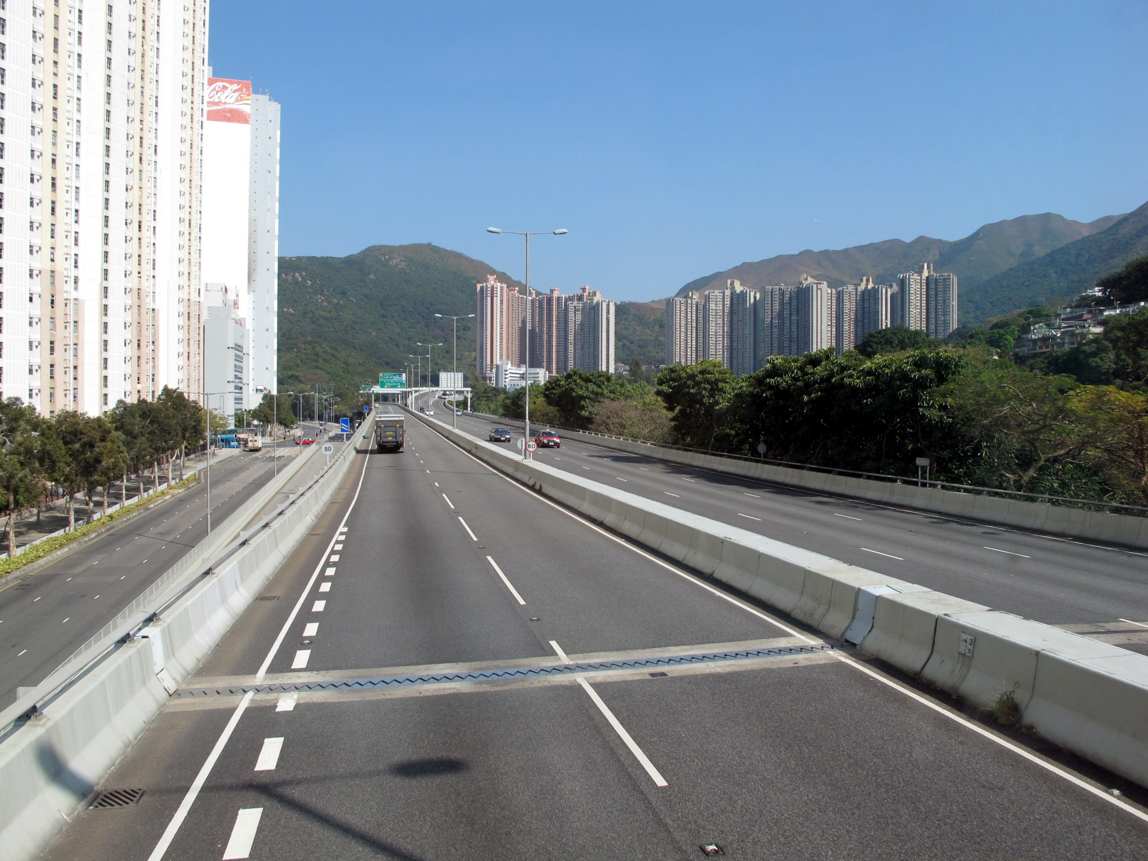 Sha Lek Highway